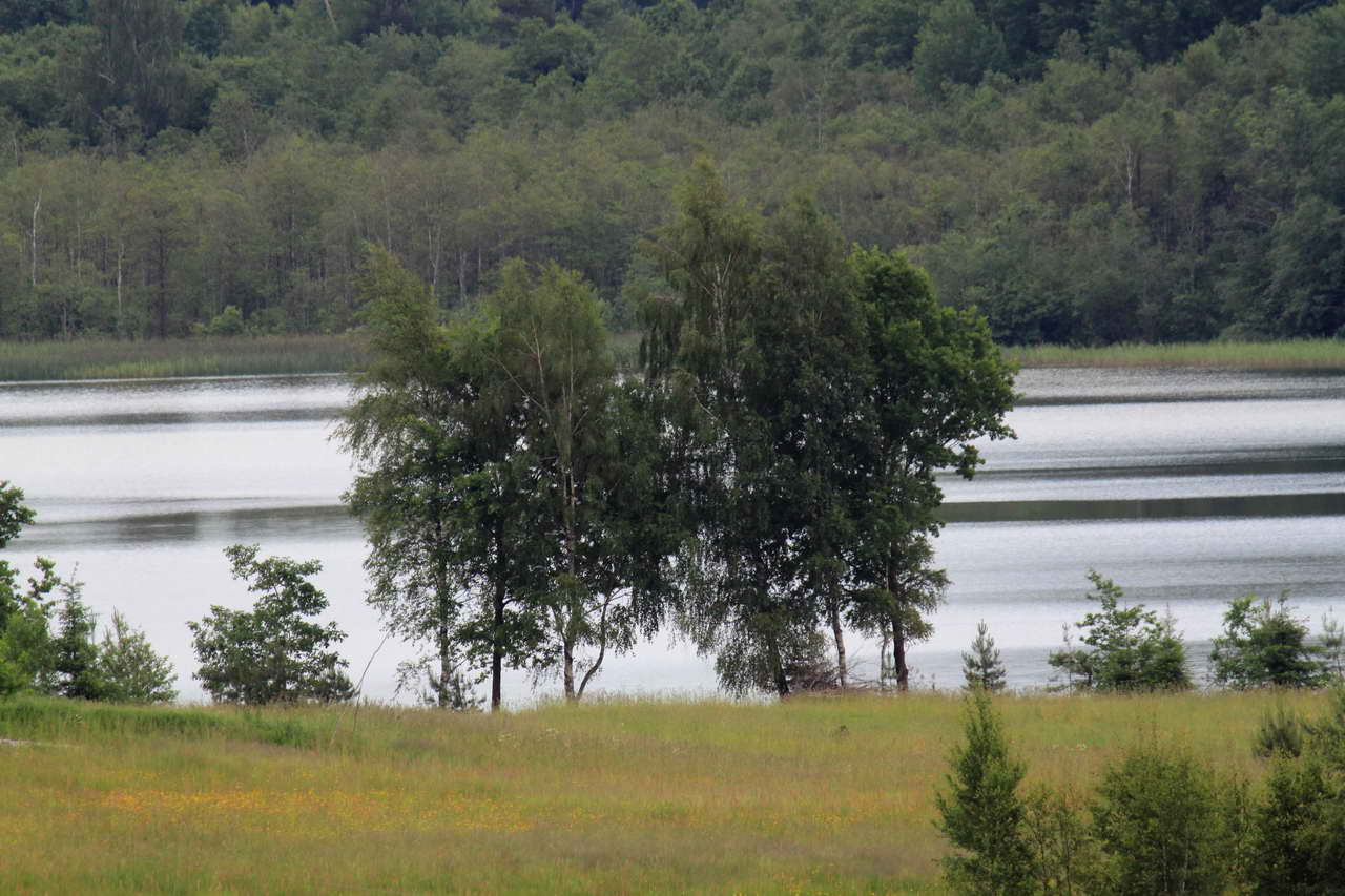 Ilgio ežeras (Pluotinės kaimas)